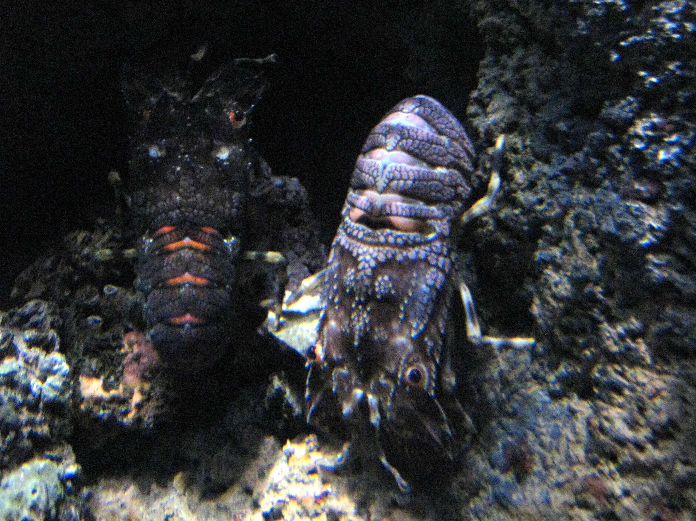 Scyllarus arctus à l'aquarium Cinéaqua